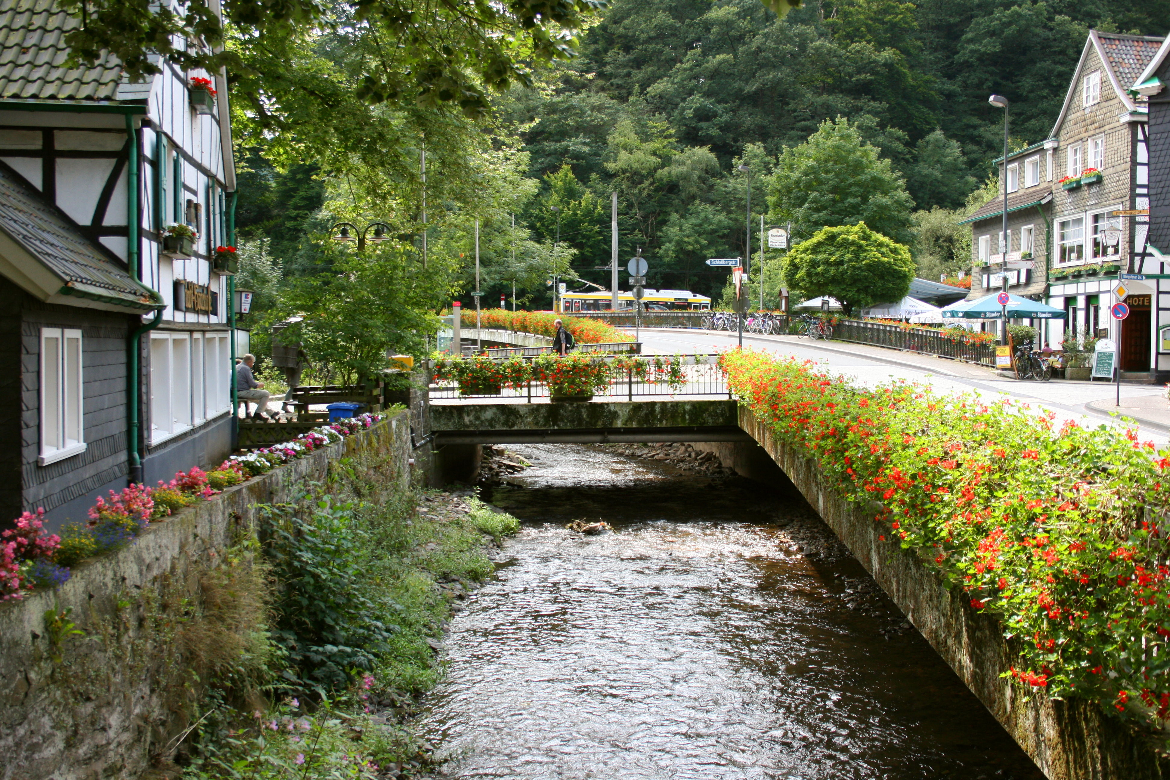 Solingen-Burg (Unterburg)